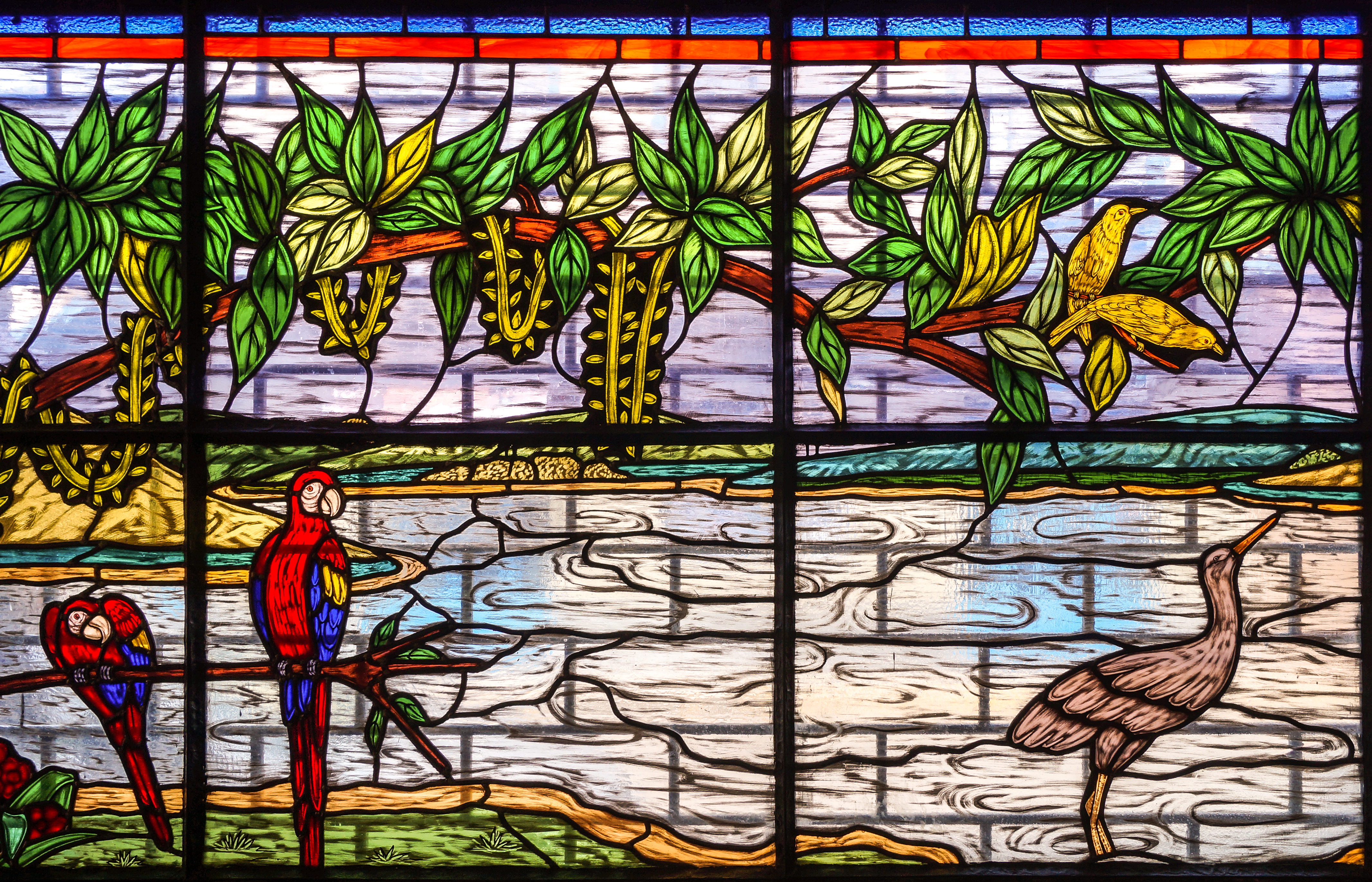 Vitral en la panadería Boconó cerca de la plaza Bolivar. Boconó. Trujillo. Venezuela